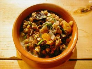 Վանա տոնածիսական ճաշ՝ մշոշ